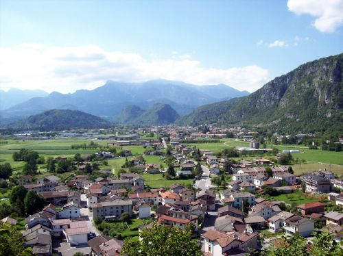 Panorama dal Col Santino di Invillino e Villa Santina (UD)